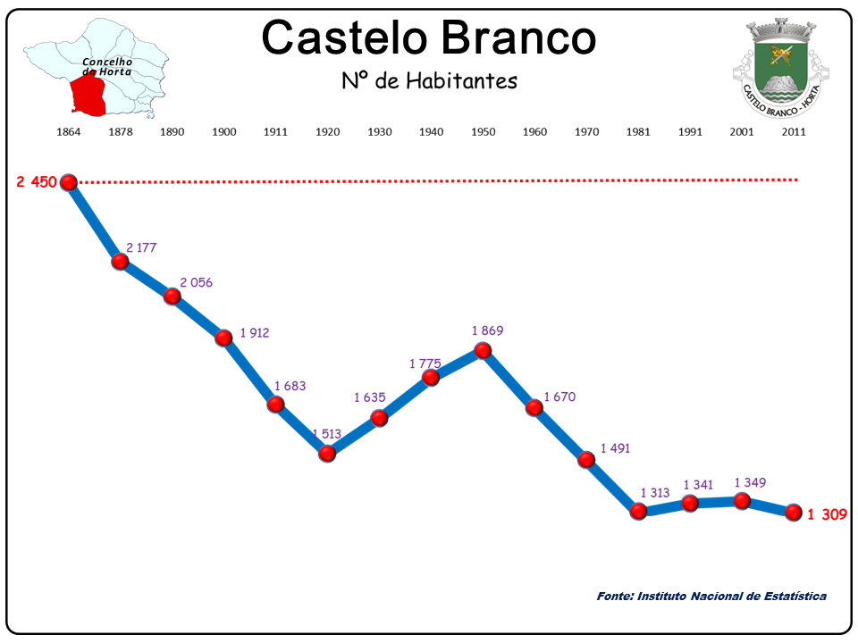 População